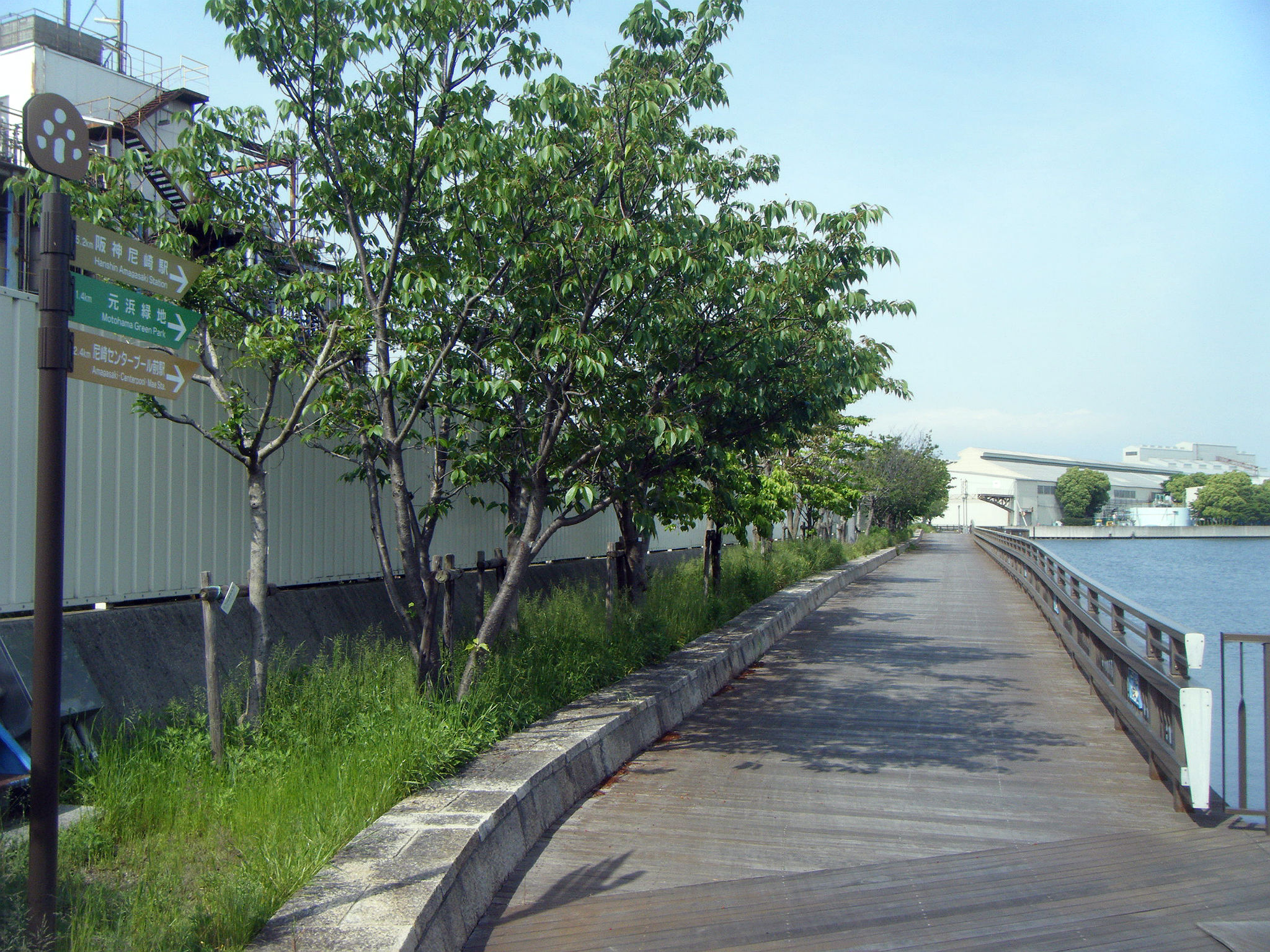 尼崎市 南堀運河（初版画像は中堀運河）